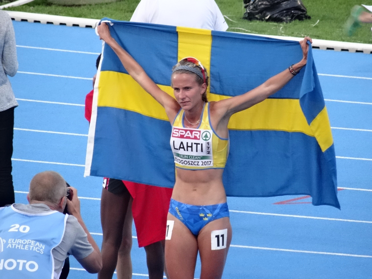 Młodzieżowe Mistrzostwa Europy w Lekkoatletyce U23 w Bydgoszczy 13-16 lipca 2017, finał biegu na 10000 m kobiet